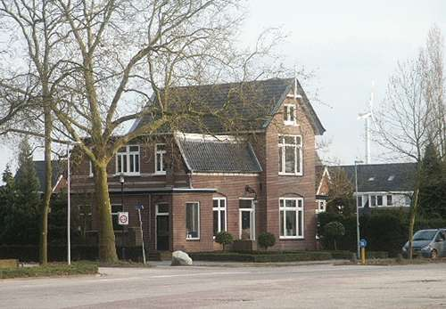 's-Heerenberg, Villa Elsa, voormalig Nederlands douanekantoor oude grens. Emmerikseweg 15